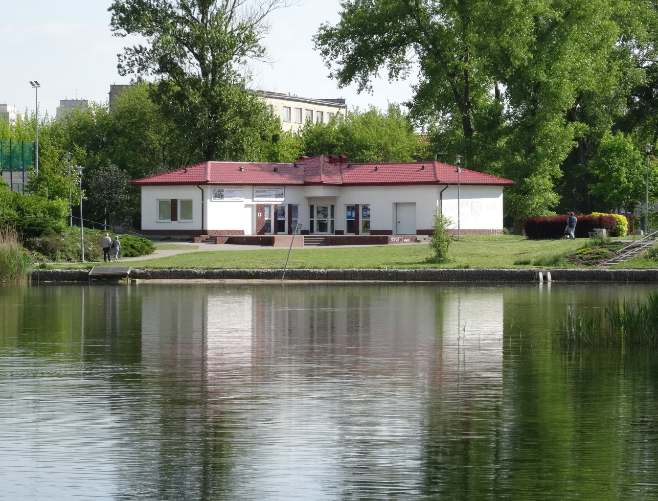 Park, staw Balaton w Bydgoszczy-Bartodziejach